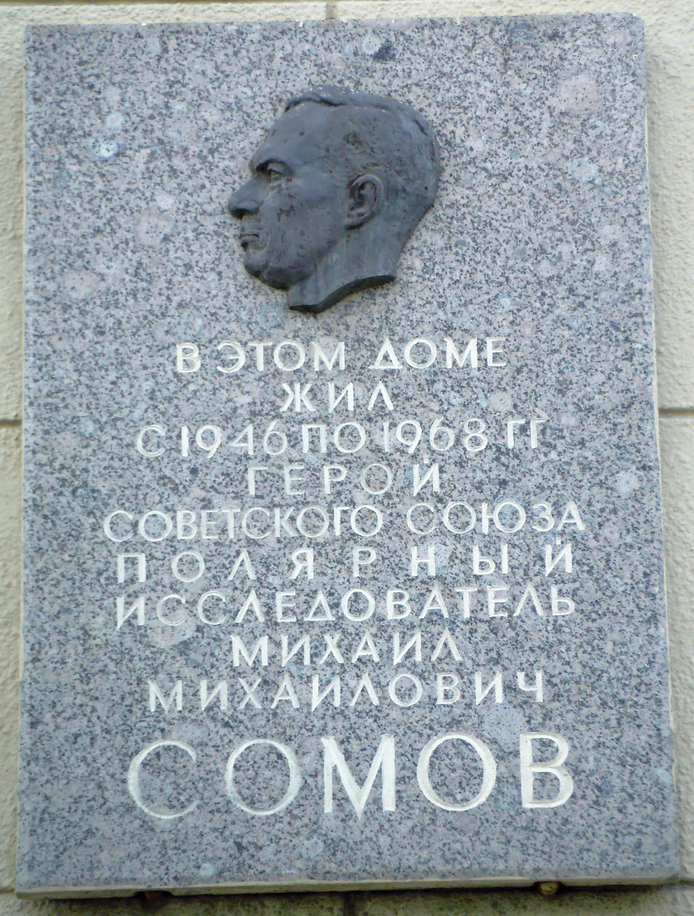 Мемориальная доска полярнику Михаилу Сомову на доме в Санкт-Петербурге (пл. Ленина, 3, "Дом полярников")